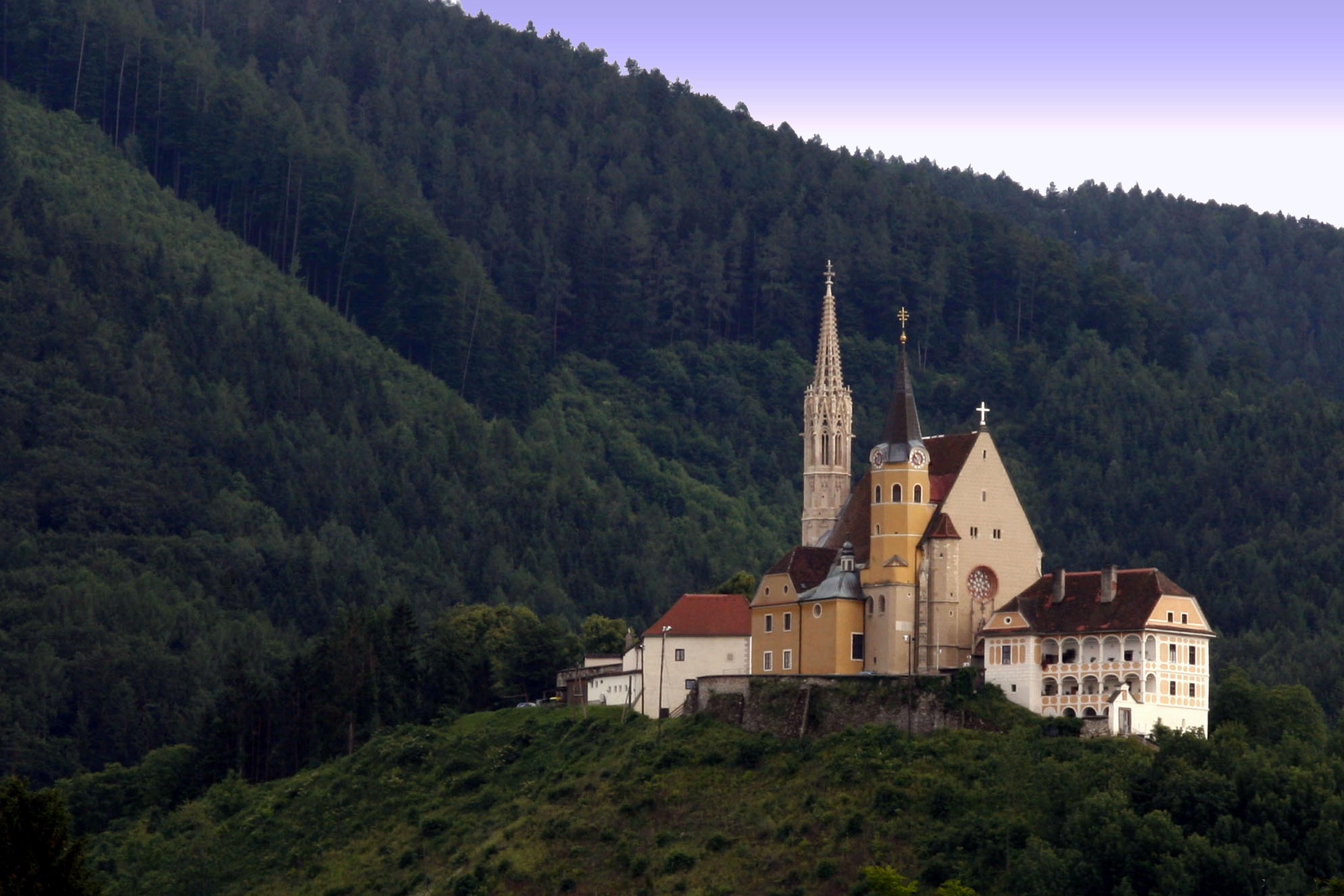 Pfarrhof, Wallfahrtskirche Maria Straßengel, ehem. Benefiziatenhaus (Ansicht von Osten, von links nach rechts)